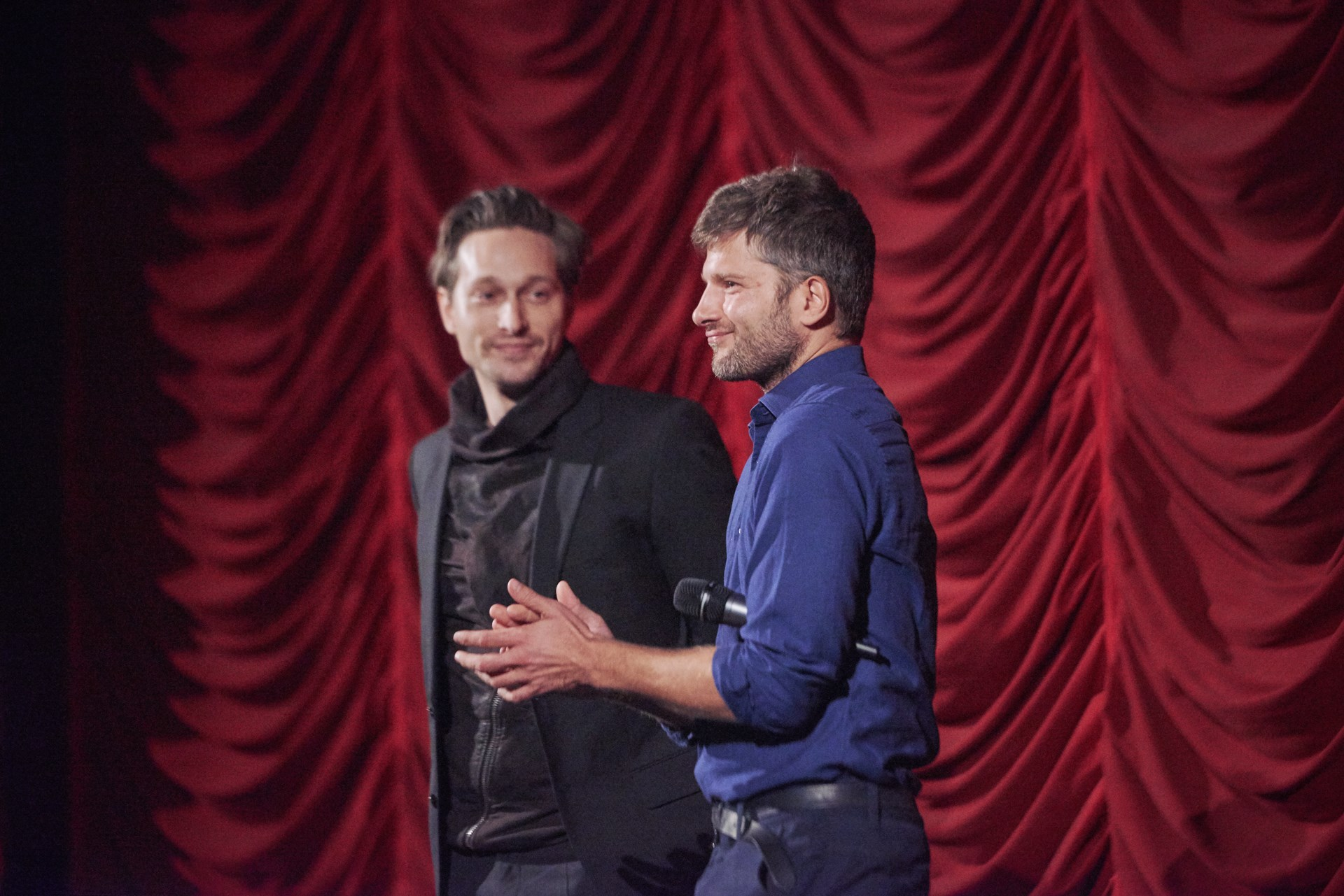 Soleil Film Premiere Guardiansoftheearth